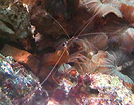 Lysmata boggessi, crevette tropicale originaire de l'Atlantique occidental